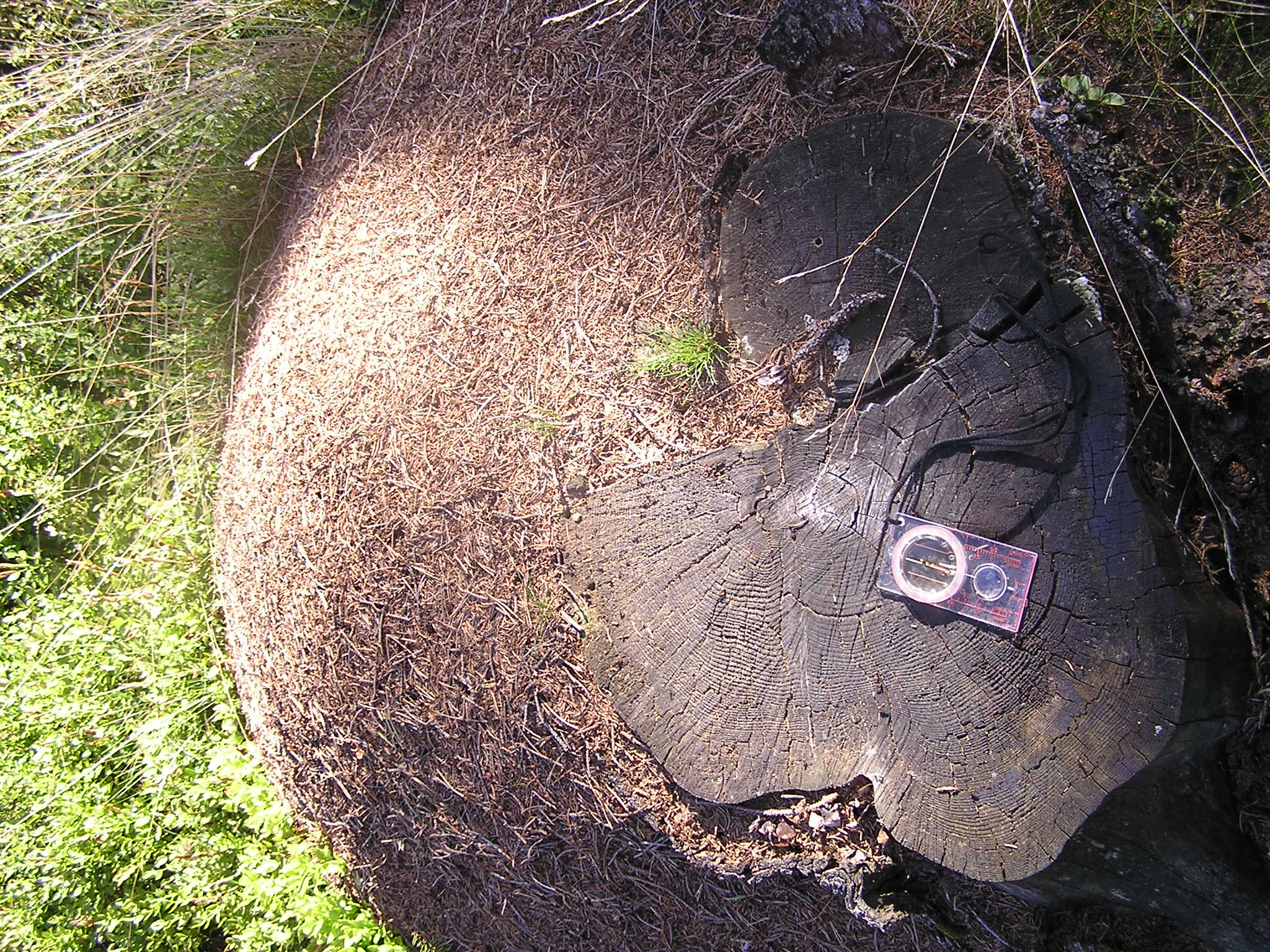 Mraveniště je na jižní straně plošší